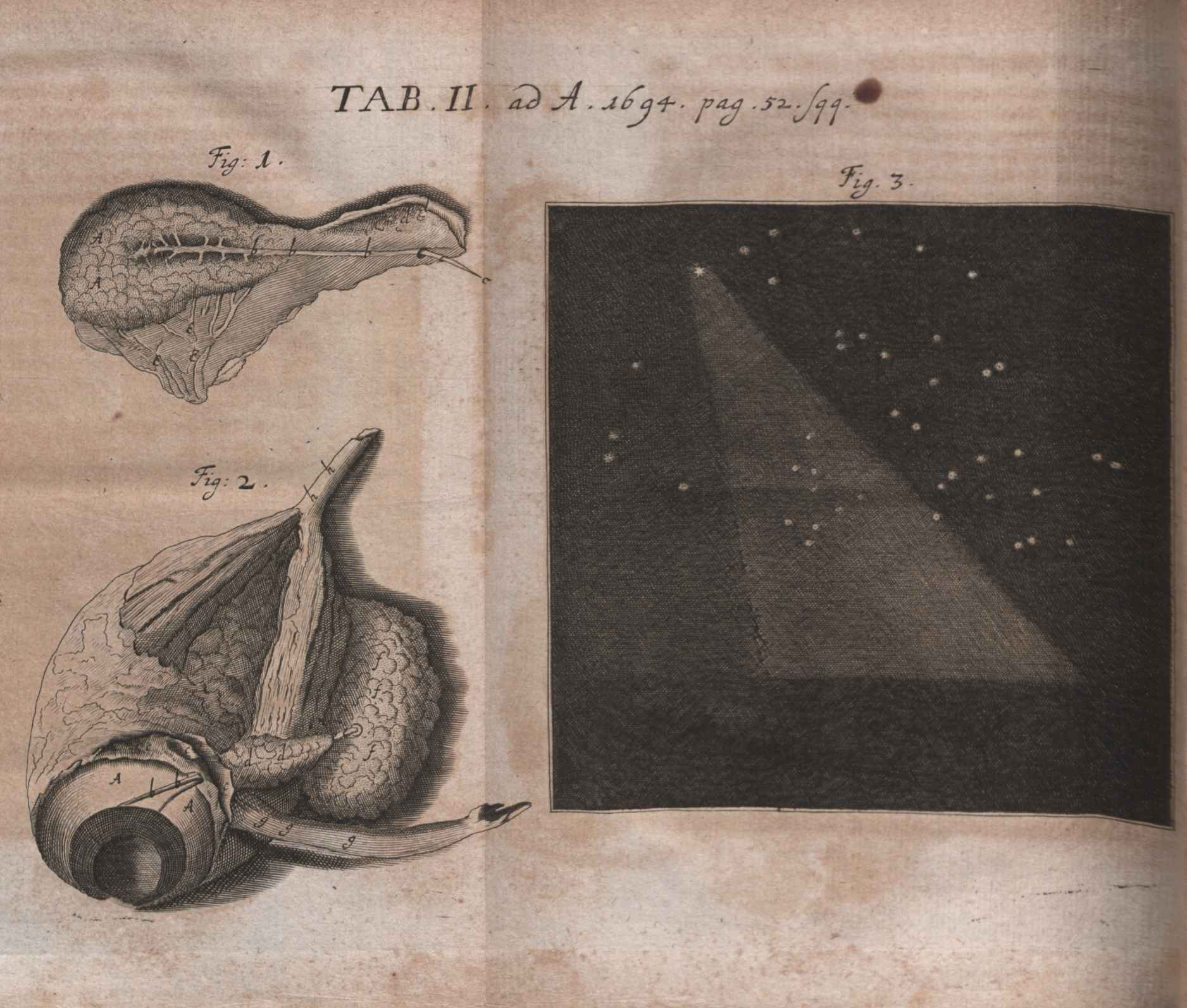 Illustration